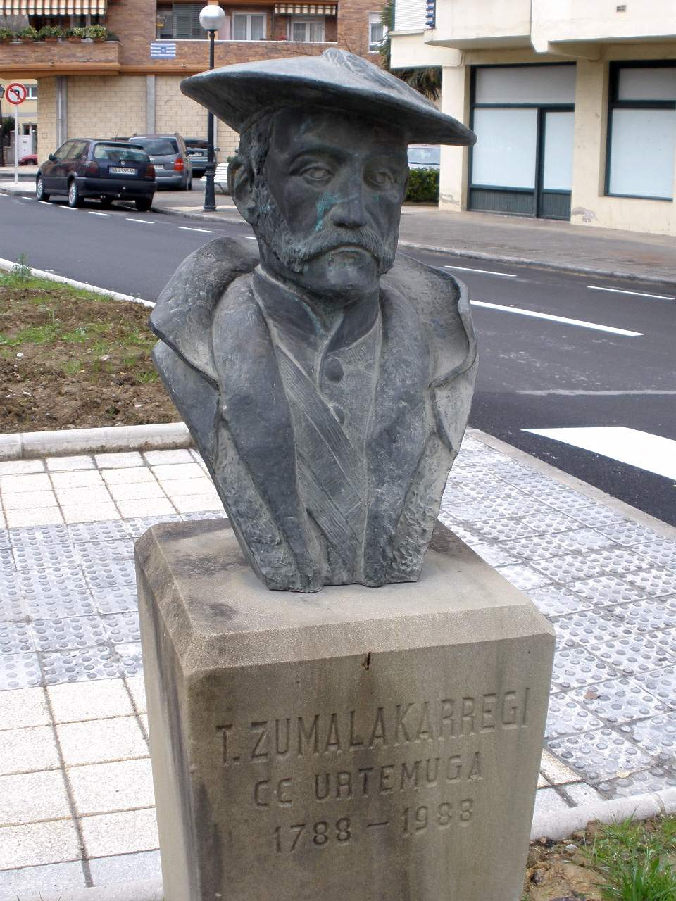 Busto de Tomás de Zumalakarregi en Ormaiztegi (Gipúzkoa)